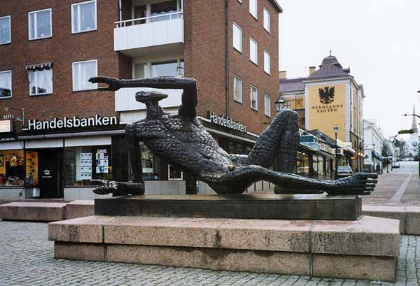 Fågelmannen, Stora torget i Arvika. Foto: Xauxa 2002